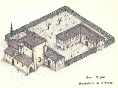 Monasterio es